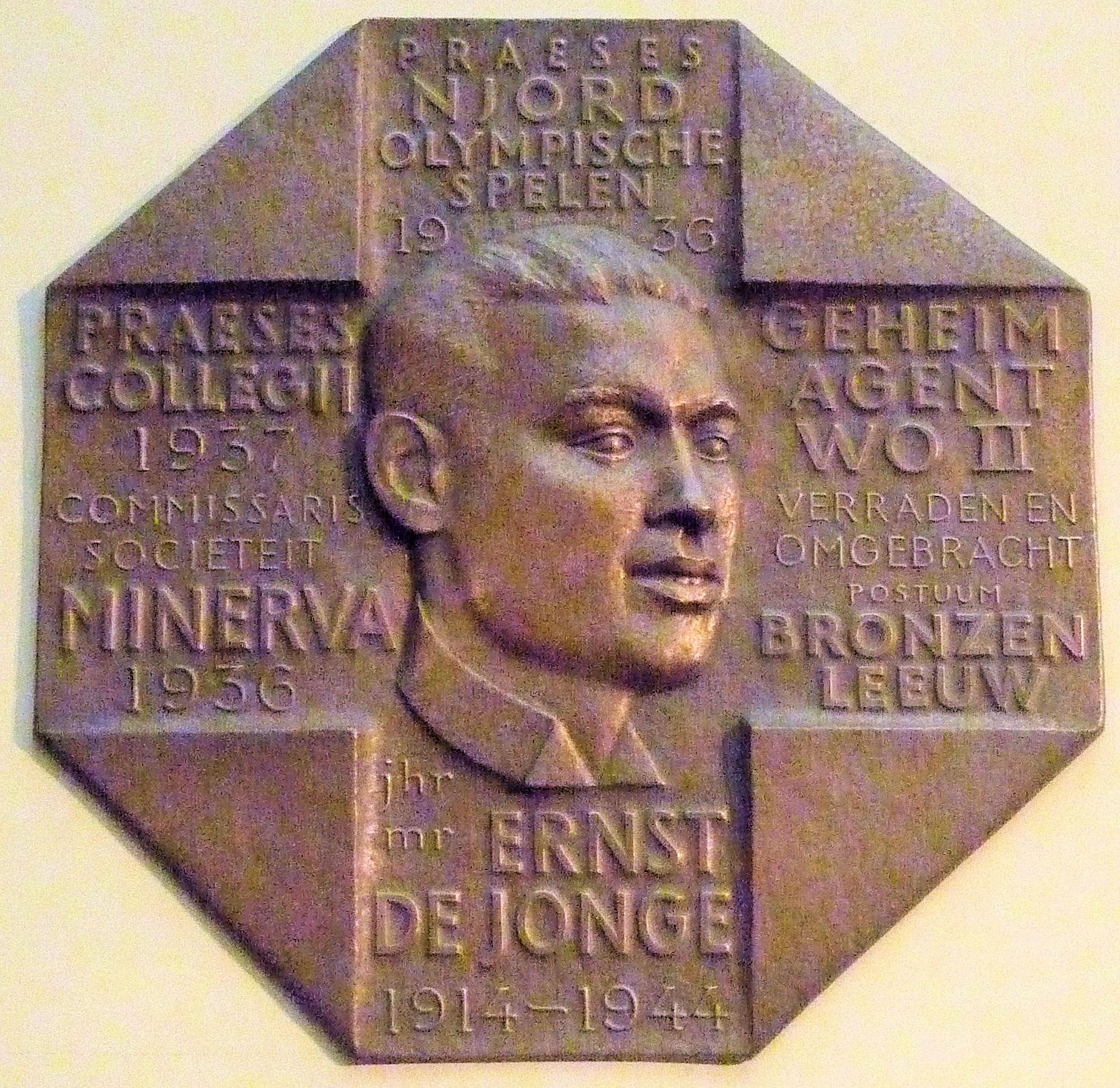 Plaquette ter herinnering aan Ernst te Jonge